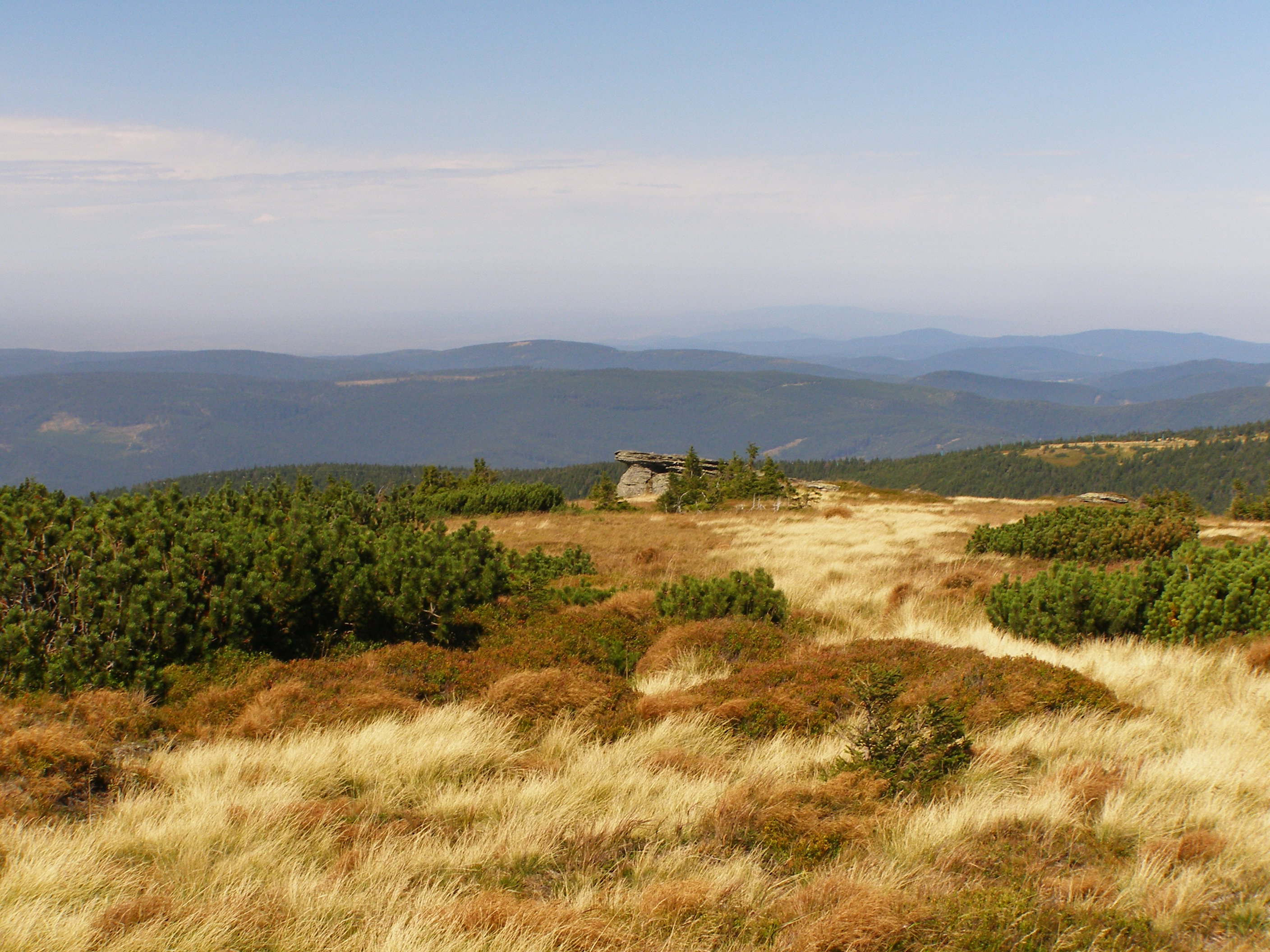 přirozené bezlesí s nepůvodní klečí